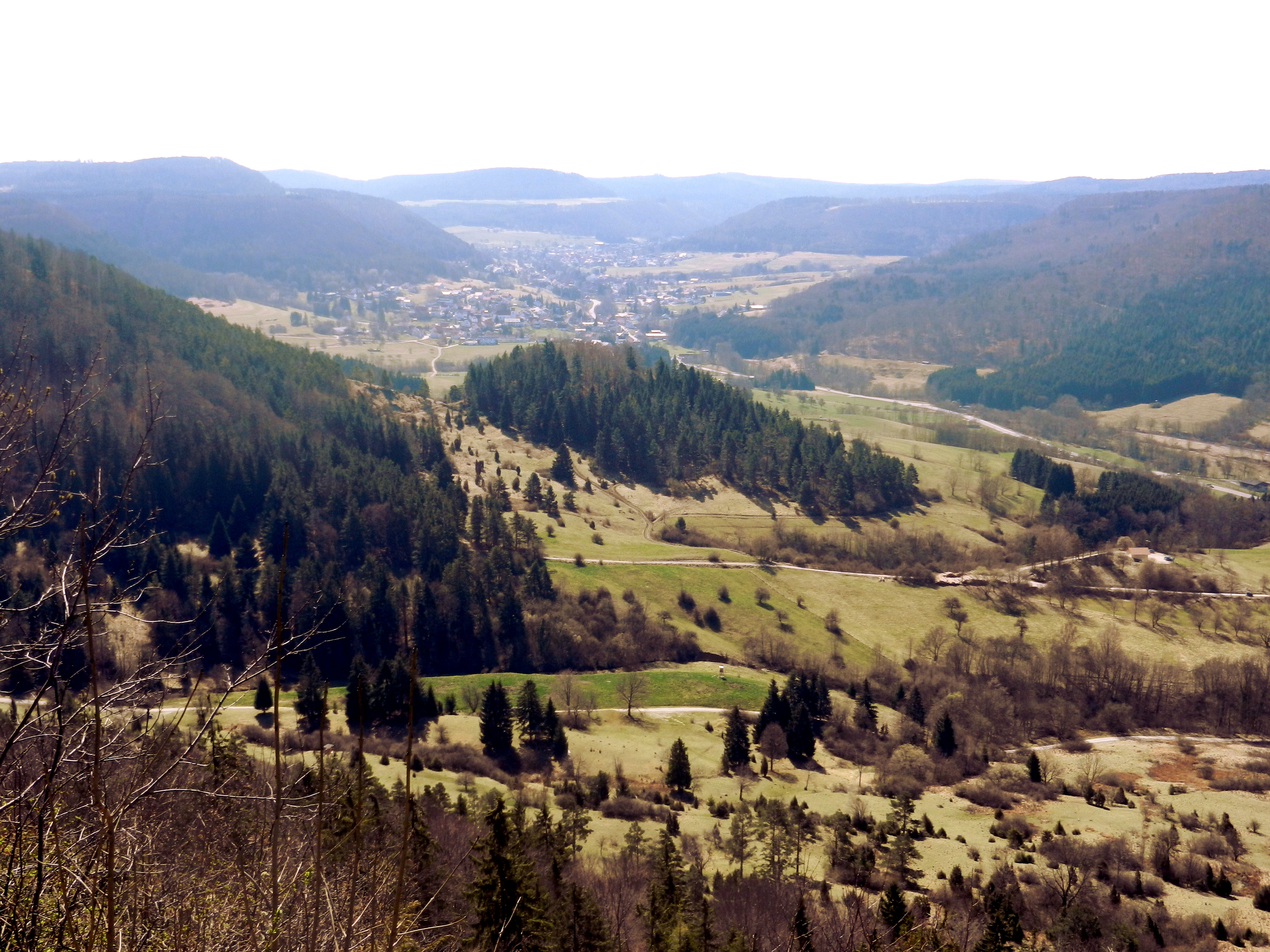 Das in ihrem Oberlauf "Killertal" genannte Tal der Starzel im Zollernalbkreis. Von vorne die Dörfer Killer, Starzeln und Hausen im Tal, alles Stadtteile von Burladingen. Die bewaldete Kuppe im Vordergrund ist das Naturschutzgebiet Bürgle.